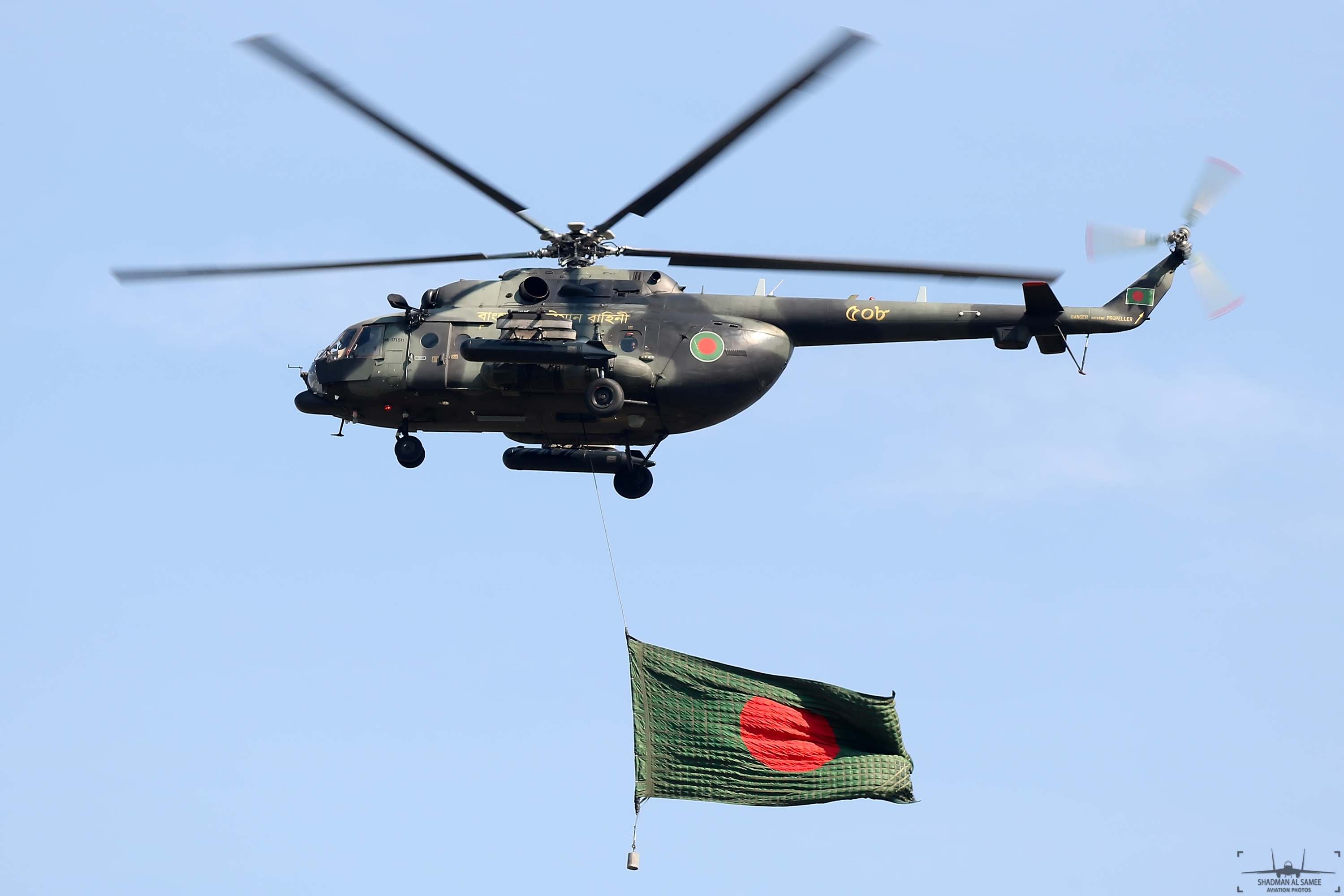 VGHS 2017: December vibes!